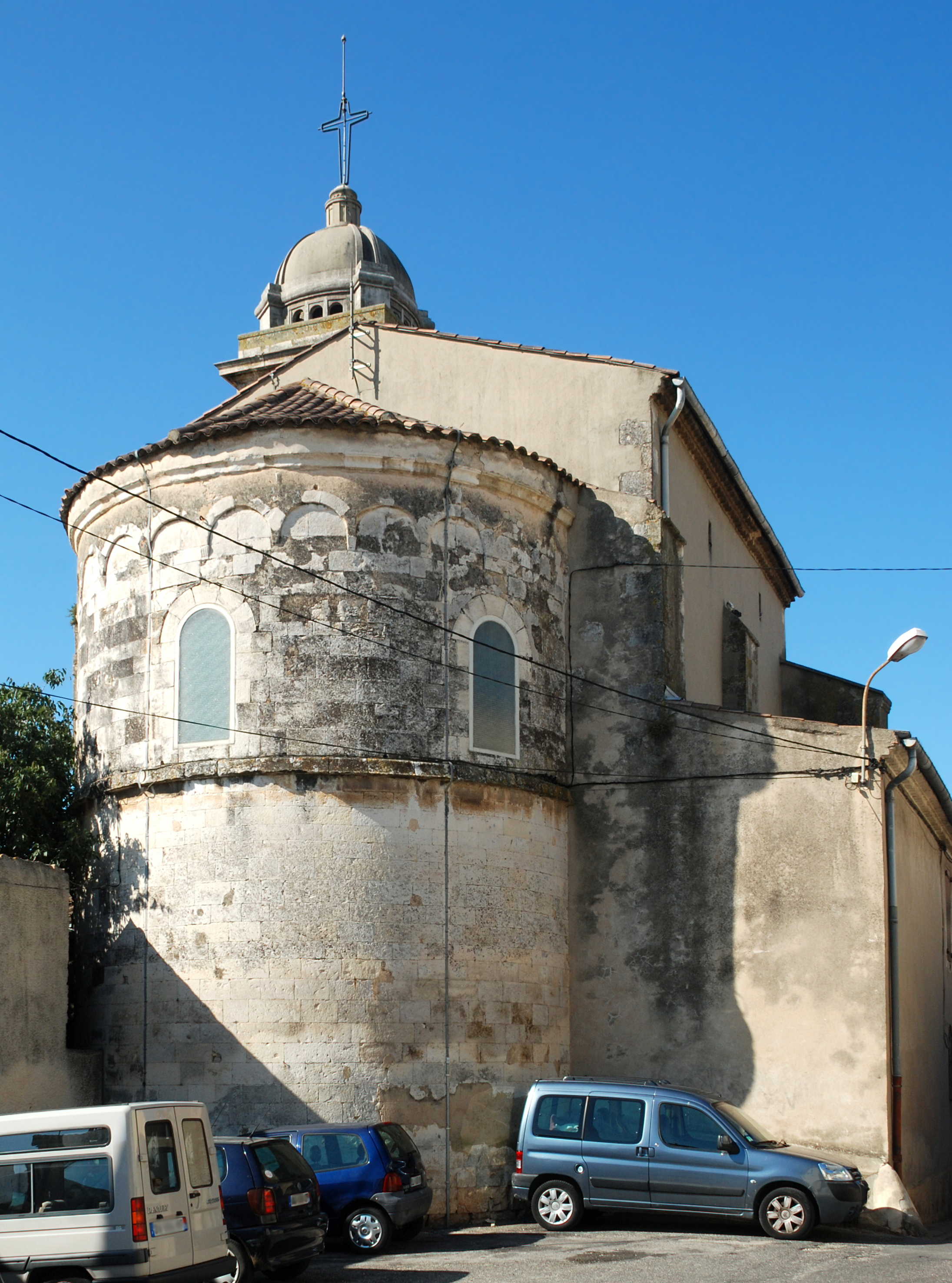 France - Gard - Église de Saint-Césaire-lès-Nîmes